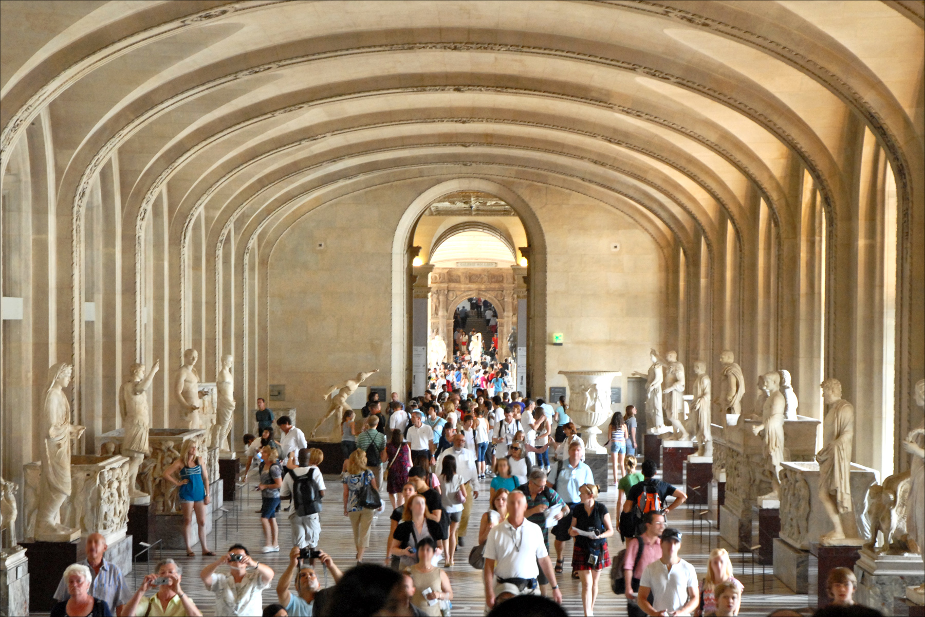 Le Musée du Louvre a accueilli 8 422 000 visiteurs en 2008 et a maintenu sa fréquentation en 2009 malgré une grève des personnels d'accueil et de surveillance en décembre. Il est le musée le plus fréquenté au monde. La fréquentation quotidienne des collections permanentes et des expositions temporaires du musée s'est élevée à plus de 27.000 visiteurs. Le site internet du musée, a attiré plus de 10,6 millions de visiteurs en 2009, soit une progression de 9,4%.